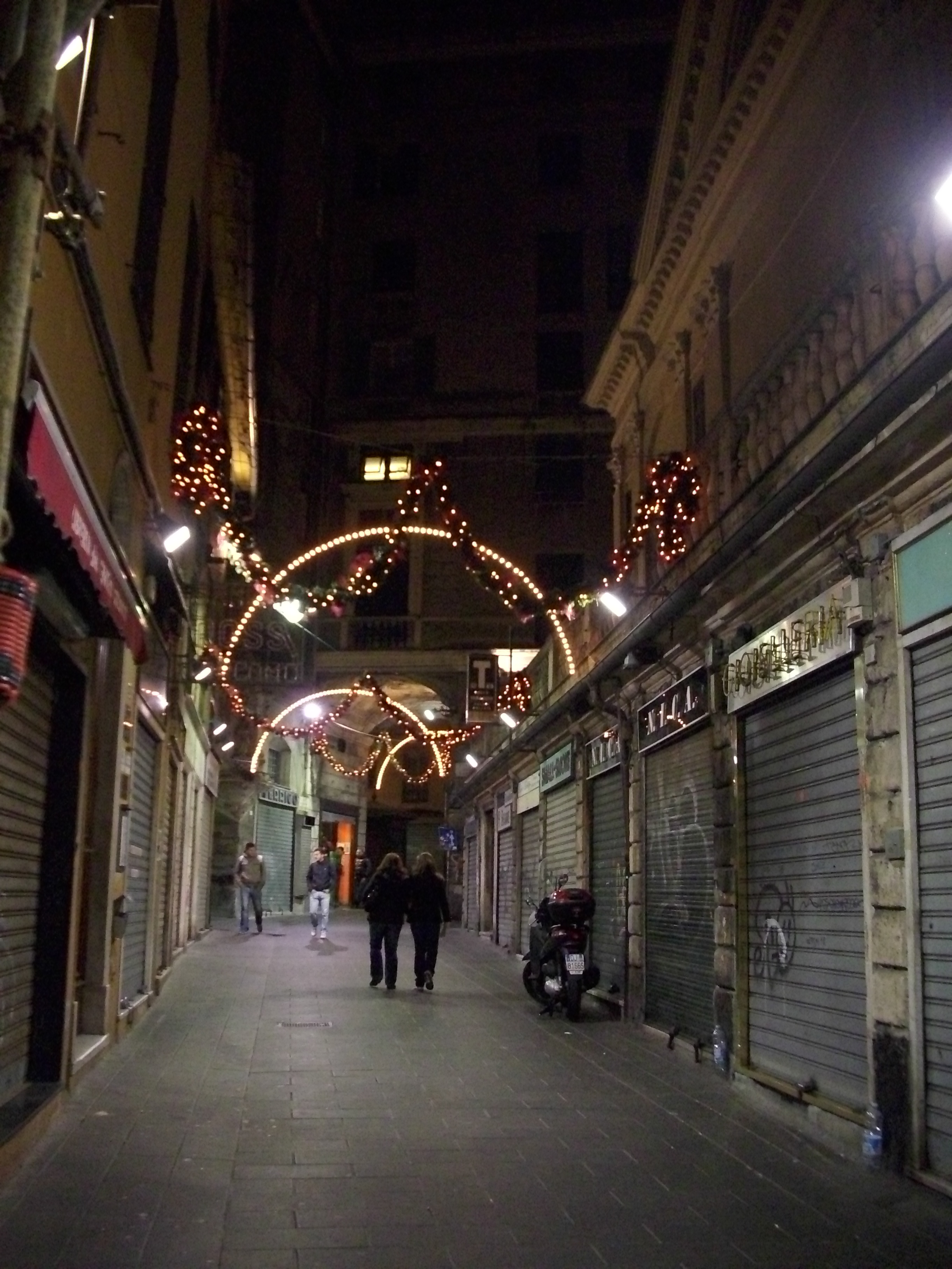 Via di San Pietro della Porta, nel centro storico di Genova. L'archivolto visibile sul fondo della via si trova nella posizione in cui un tempo vi era porta di San Pietro (appartenente alla cinta muraria del IX secolo).